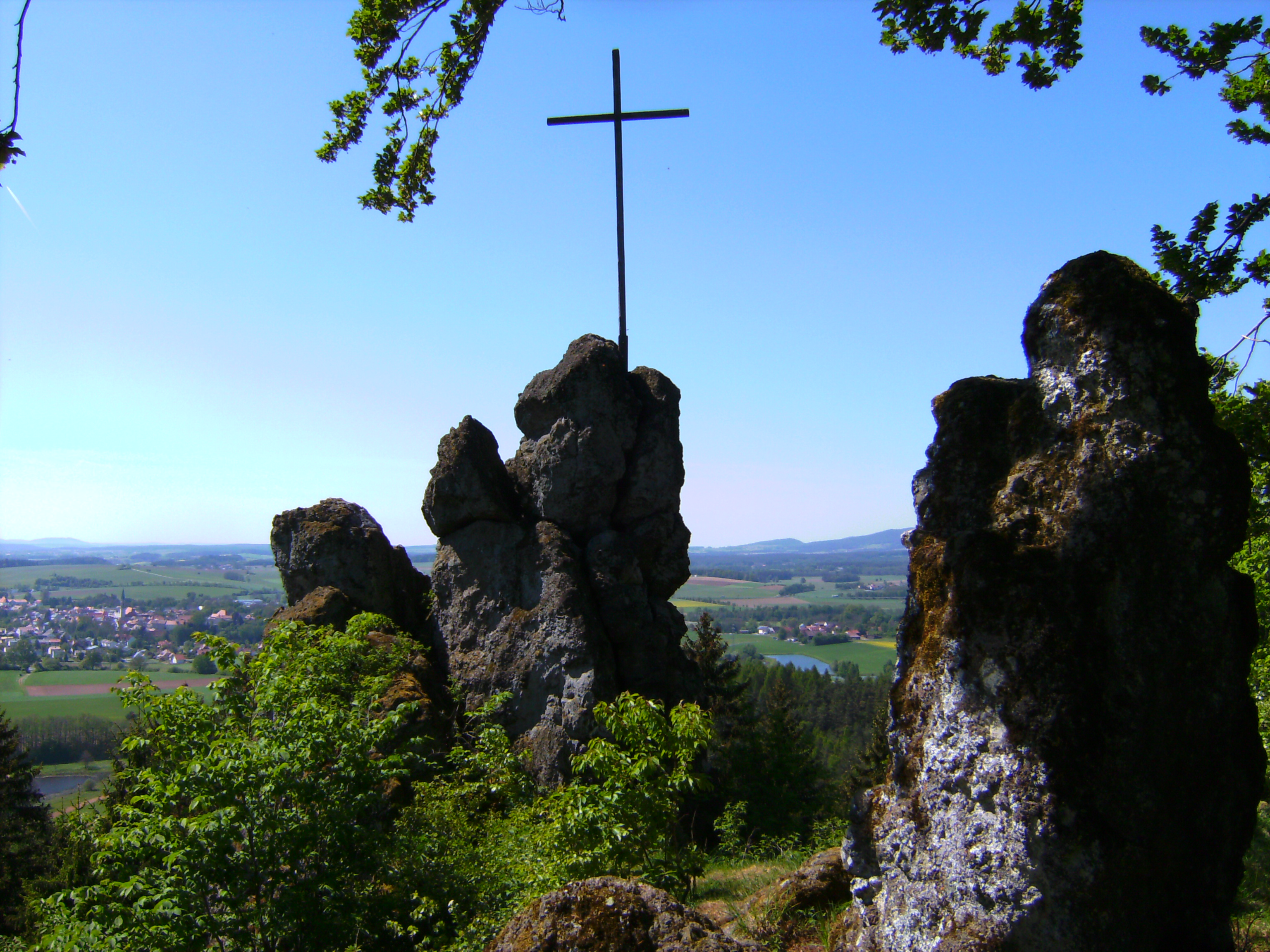 Anzenstein